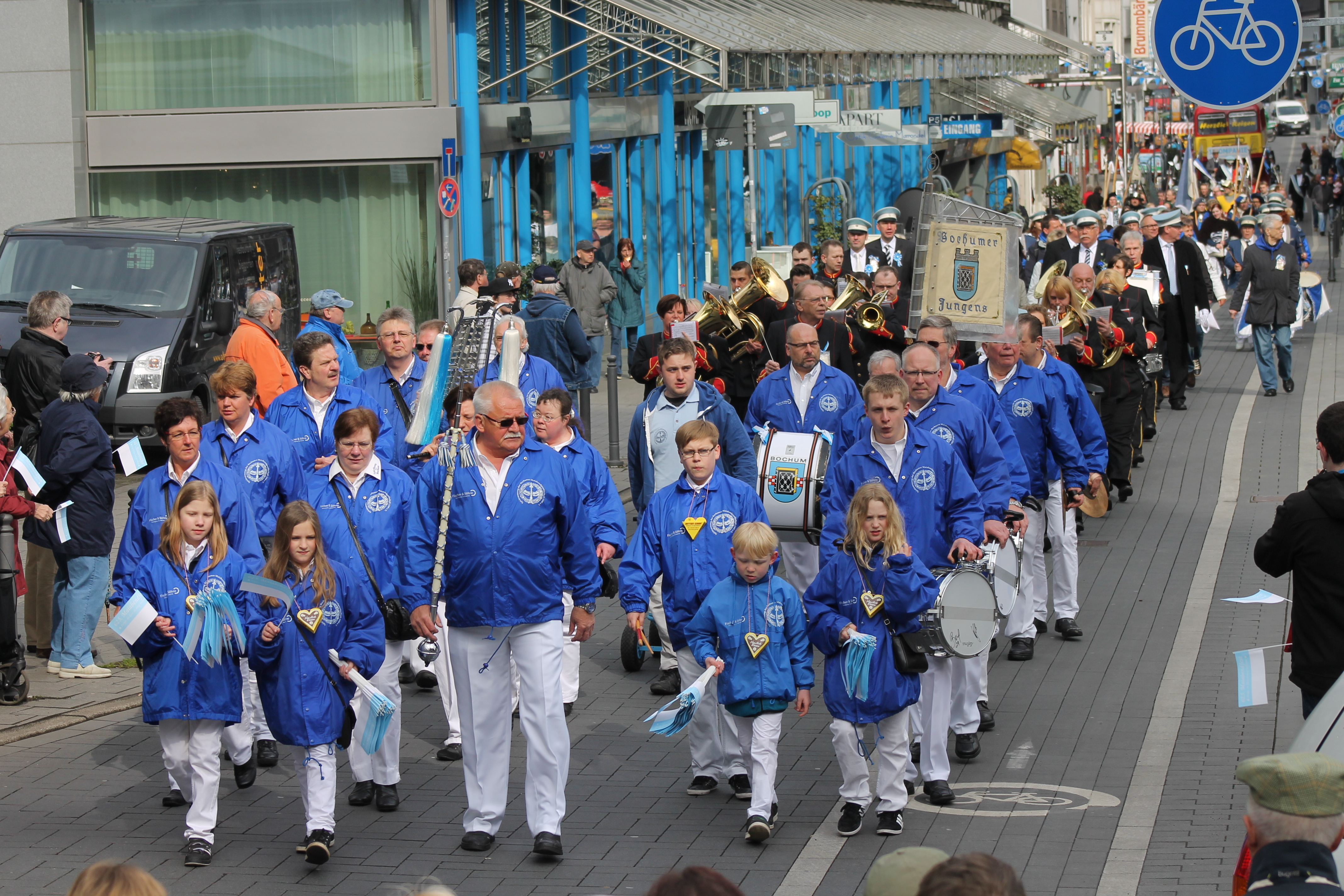 Festumzug zum traditionellen Maiabendfest in Bochum am 27. April 2013. Hier ziehen die Maischützen nach Bochum-Harpen aus.